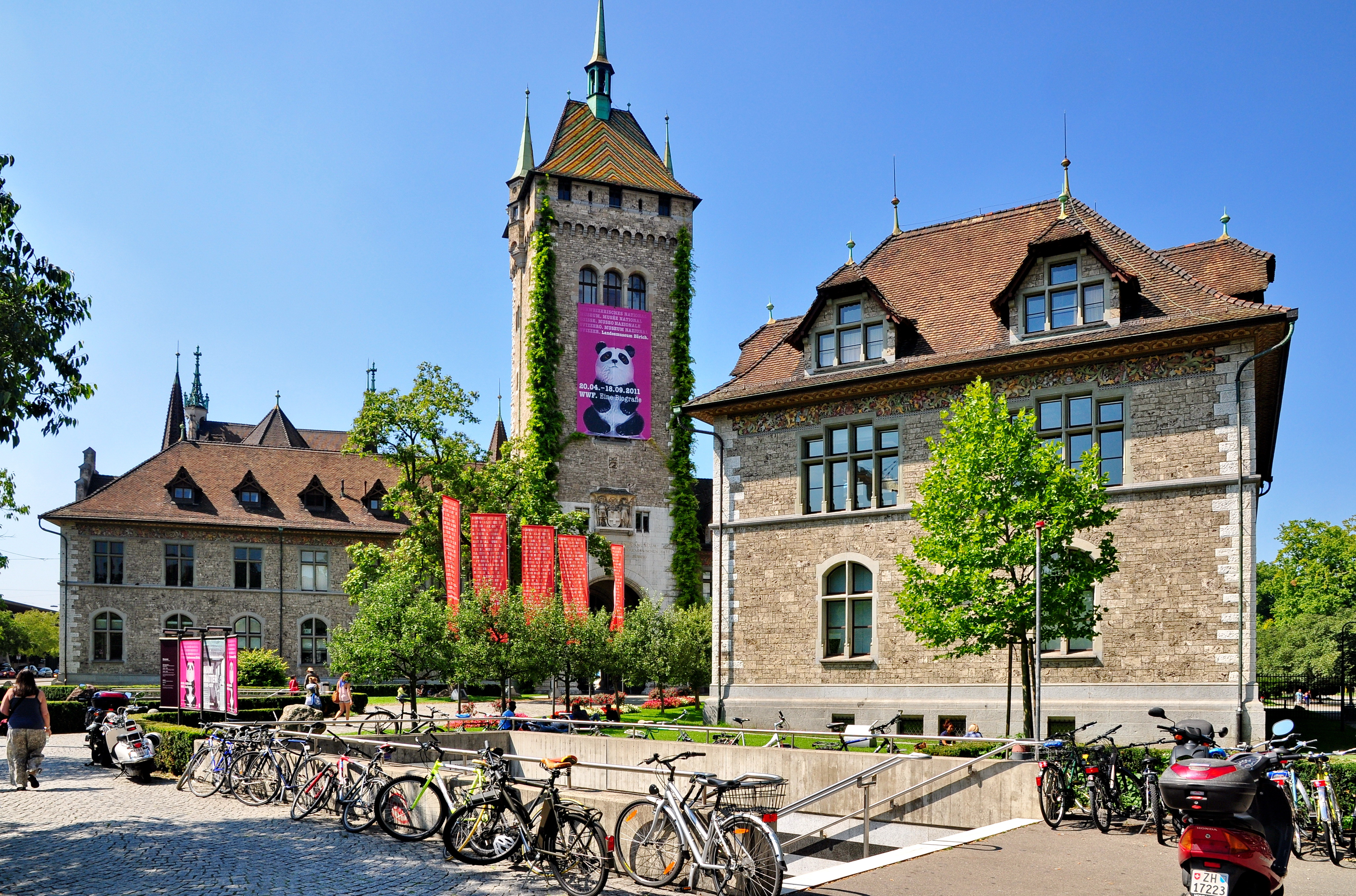 Landesmuseum in Zürich (Switzerland)